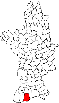 Categorie:Hărţi ale judeţului Olt